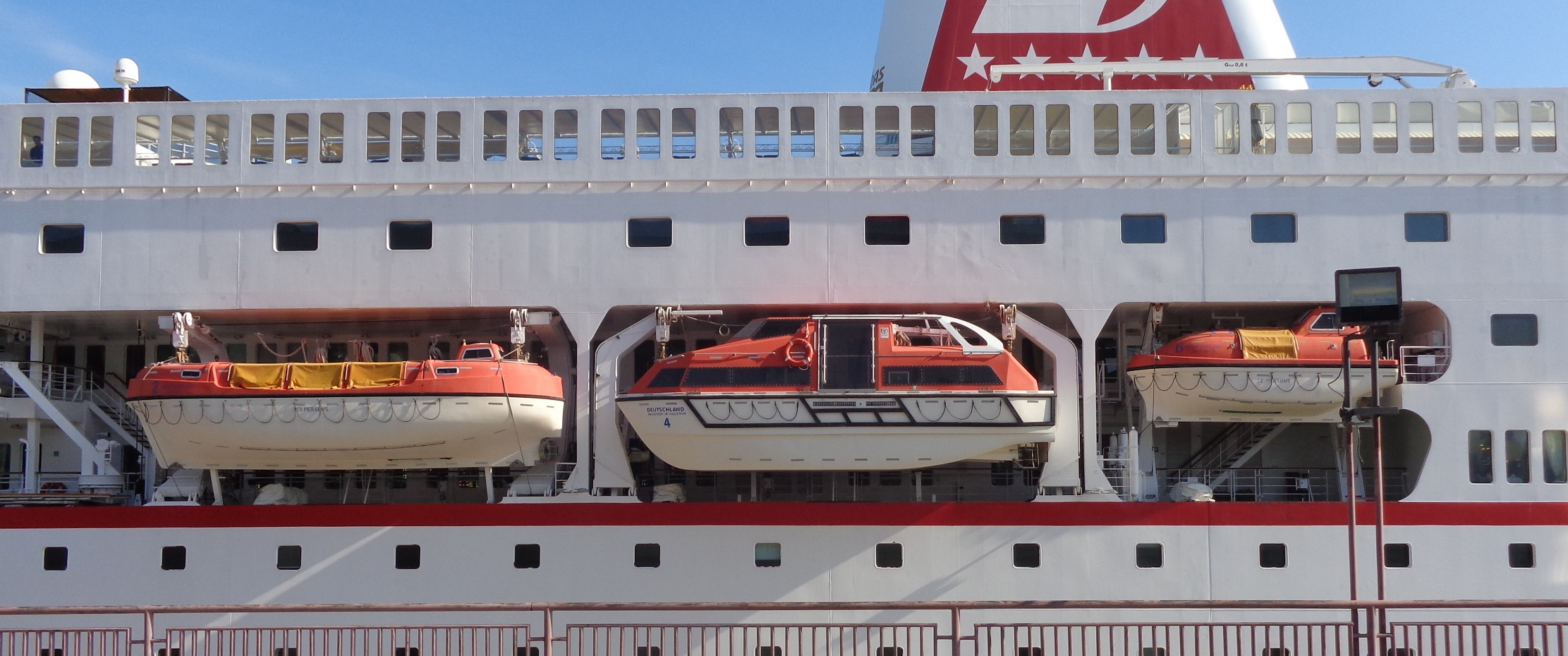 Drei von sechs Rettungsbooten des MS Deutschland (Backbordseite): Die beiden linken/vorderen nehmen jeweils 150 Personen auf. Das kleine hintere nimmt 32 Personen auf und wird als schnelles Boot nur zur Bergung von über Bord gegangenen Menschen eingesetzt. Das mittlere ist ein Katamaran, der bei Ankerungen Personen an Land verbringt.